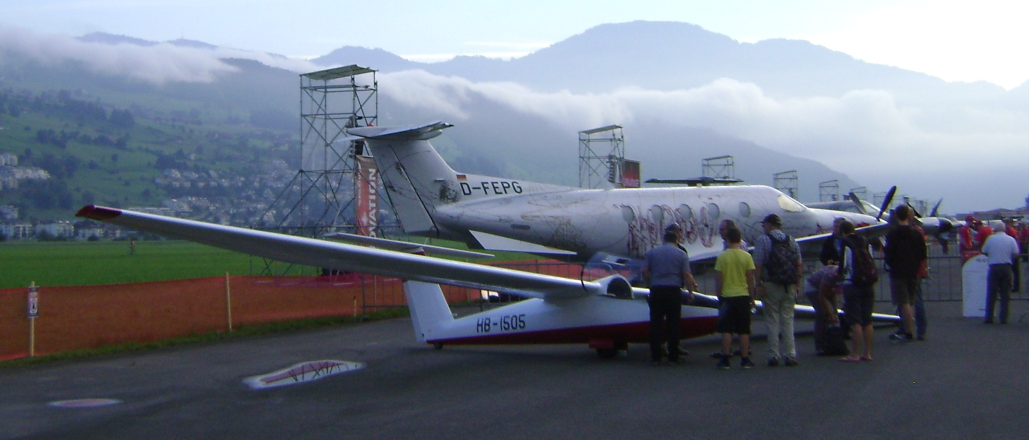 Pilatus PC-11B4